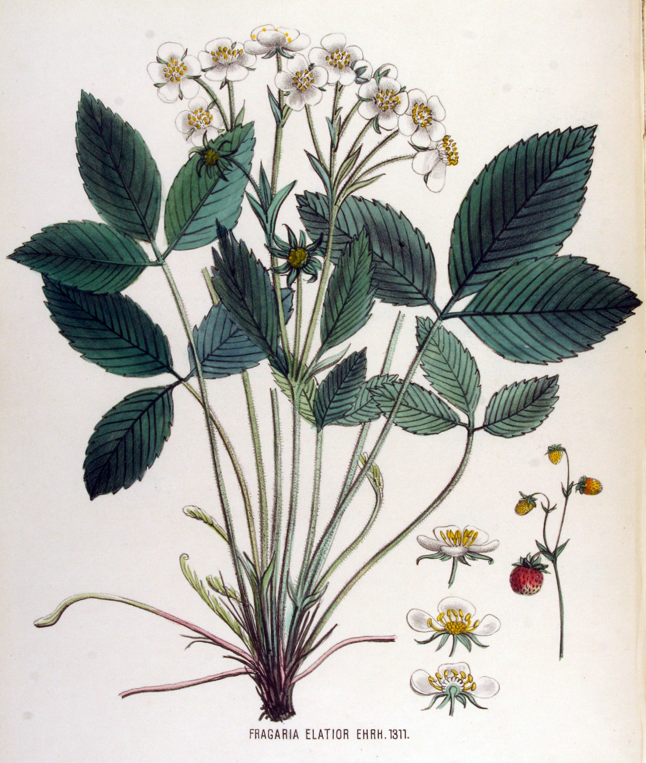 Fragaria moschata Weston (Syn. Fragaria elatior Ehrh.)